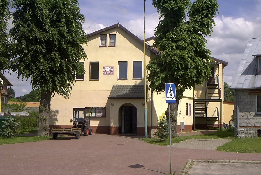 Karlino; hala sportowa przy ul. Kościuszki; autor zdjęcia Kluka; 02.02.200r.